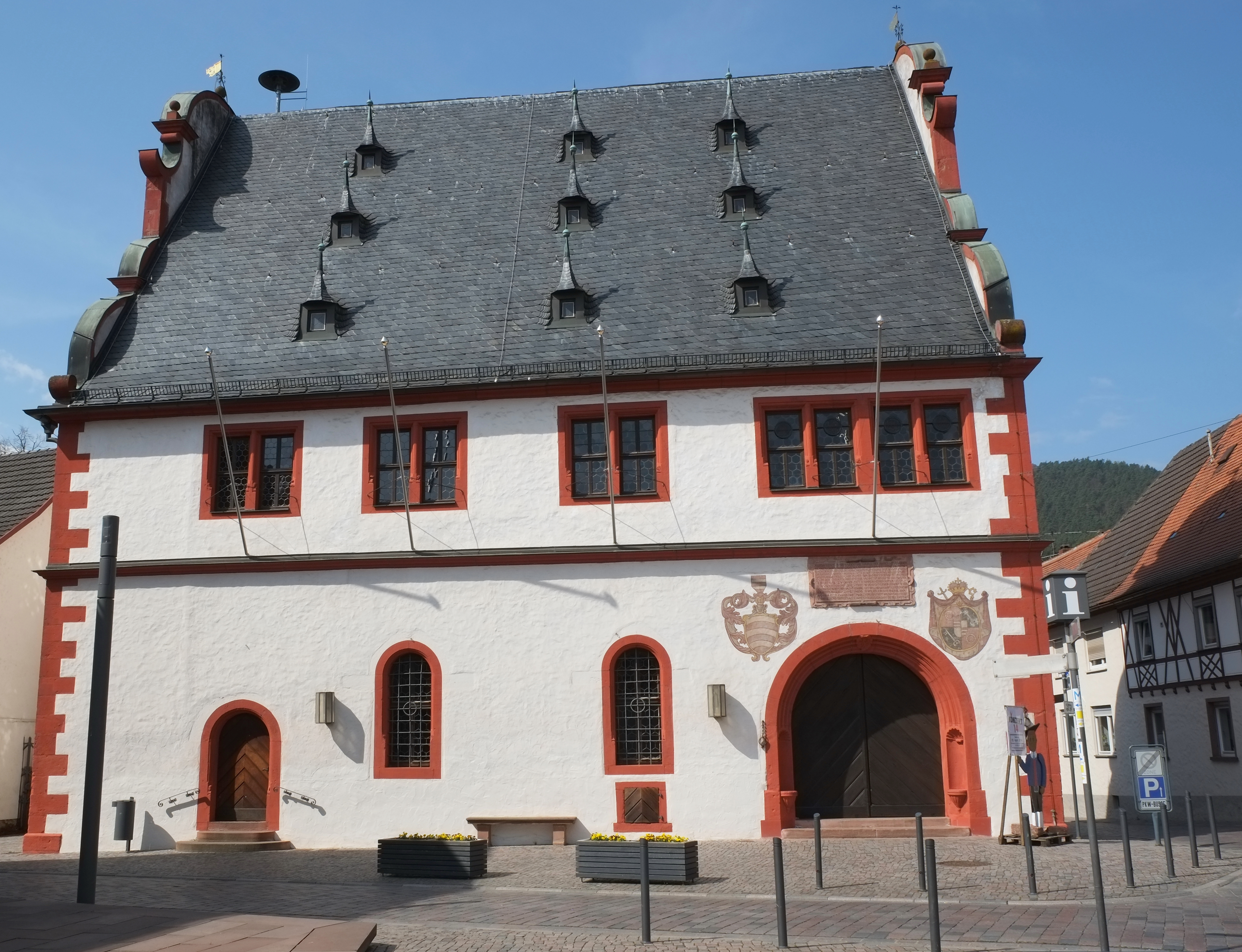 Rathaus in Bürgstadt im Landkreis Miltenberg (Bayern, Deutschland)